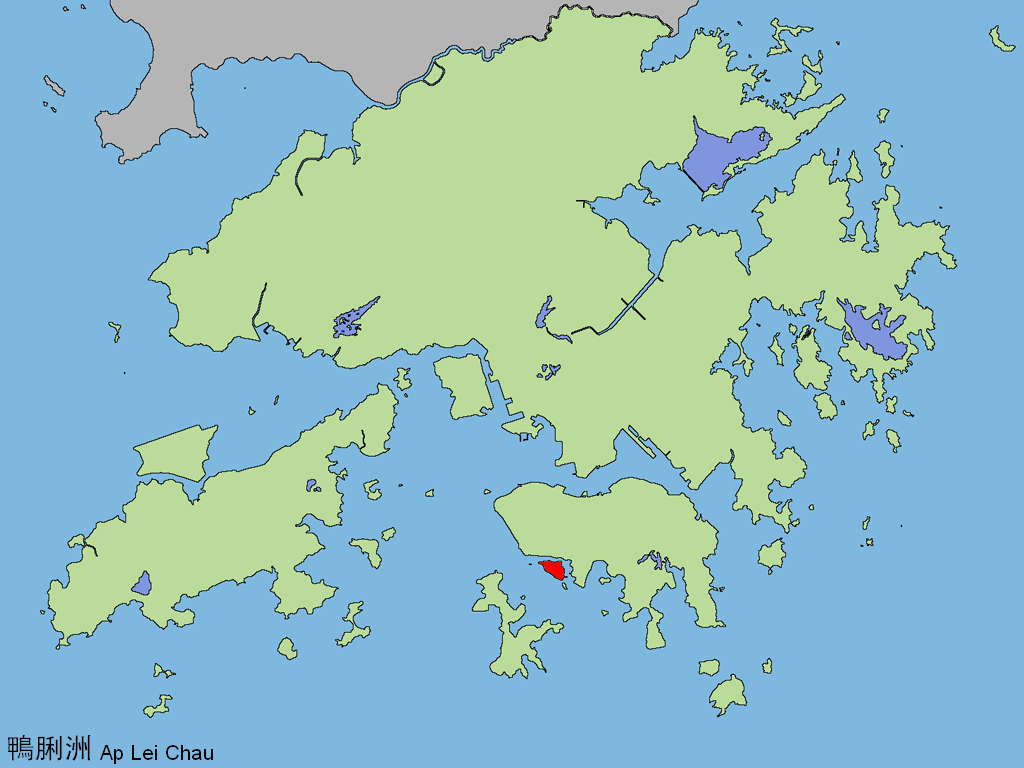 中文（香港）: 香港鴨脷洲位置圖。